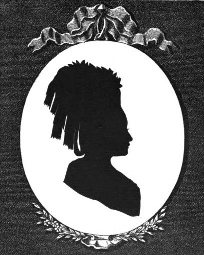 Елизавета Кирилловна Апраксина, ур. Разумовская (1749—1813), фрейлина, с 1776 года была замужем за Петром Фёдоровичем Апраксиным (1728—1813).